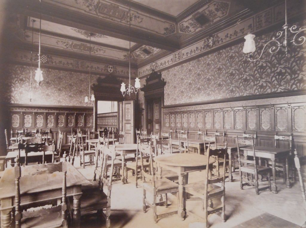 Notranjost Narodnega doma v Mariboru.